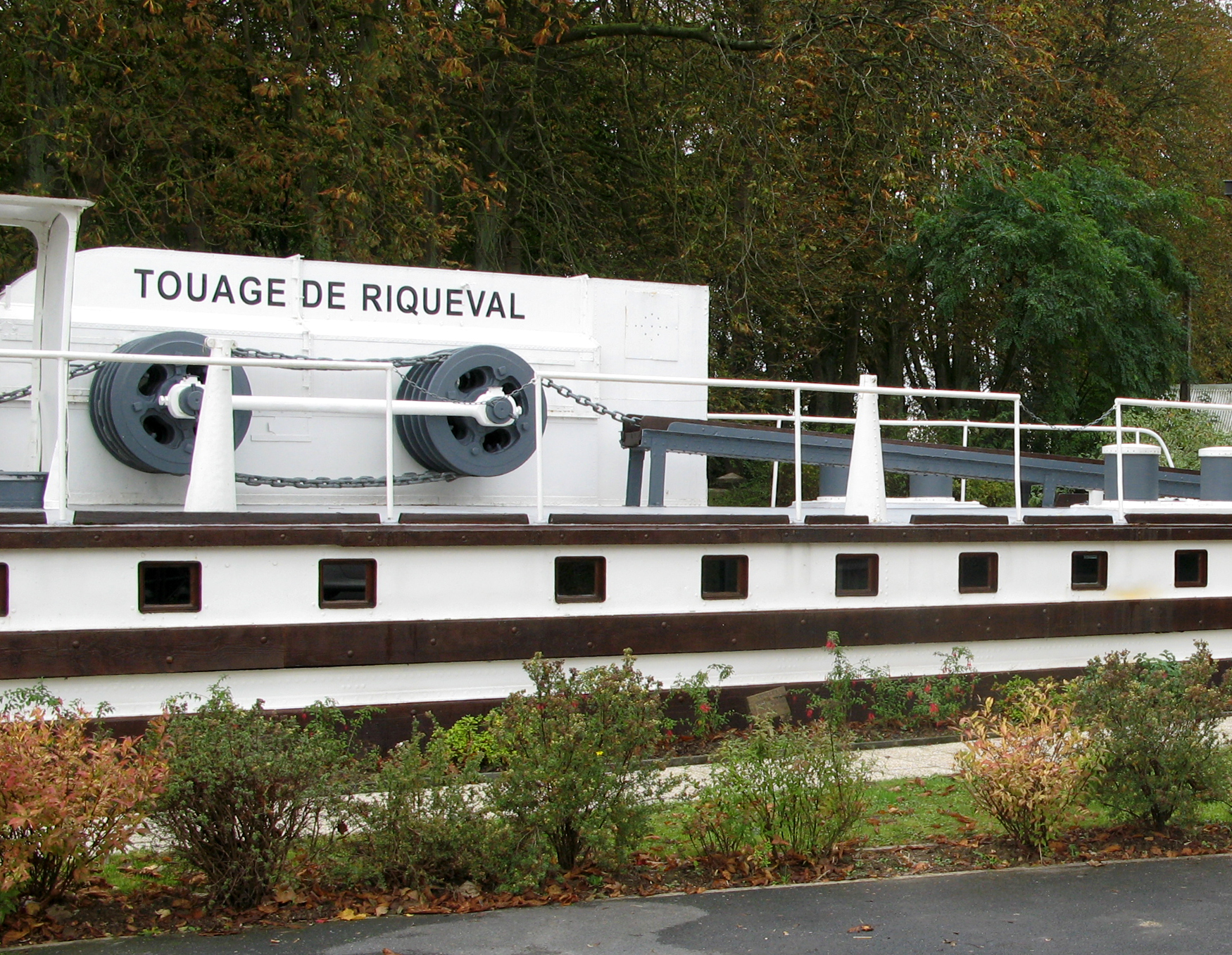 Riqueval, hameau de Bellicourt (Aisne, France) - Le touage. Le Musée du touage est installé dans l'ancien toueur, visible à l'entrée de l'"Office de tourisme du Vermandois". .